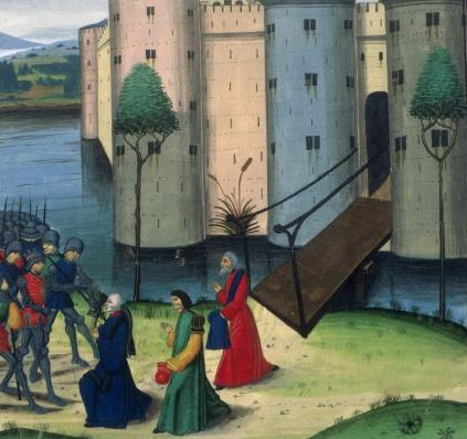 Titre: Reddition de Célènes, Quinte-Curce, Histoire d'Alexandre le Grand (traduction Vasque de Lucène), Belgique, Flandre, XVe siècle Cote: BNF Richelieu Manuscrits occidentaux Français 47, Fol. 16 ICR: 2079 Licence: Identifiant: 08100011 Image Nunéro: 10 Source: Site de Gallica